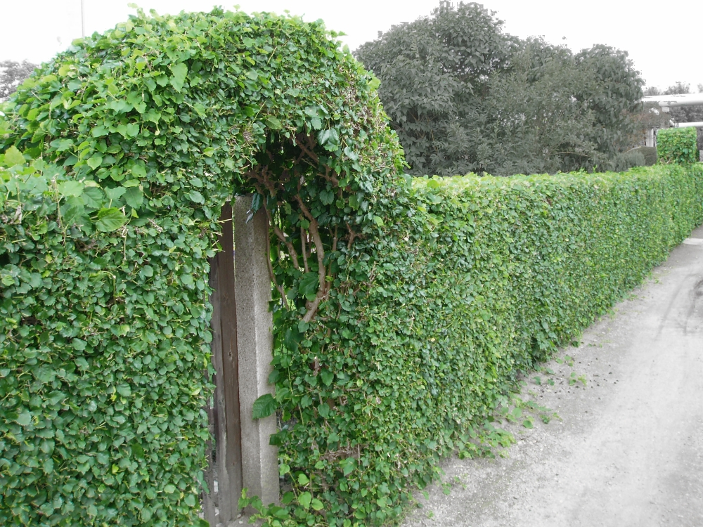 Morus nigra, Hedge in Leipzig, Germany